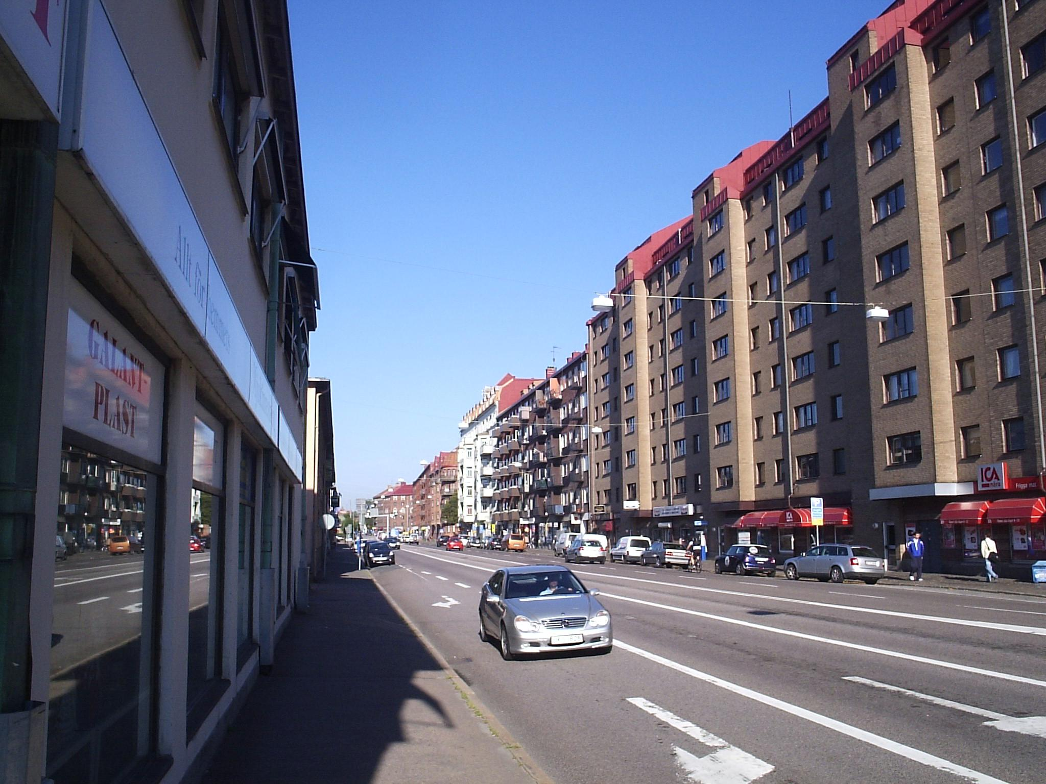 Bilden är fotograferad av Harri Blomberg. Photo by Harri Blomberg.